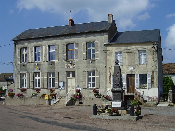 Mairie de la commune de Mhère (Nièvre)